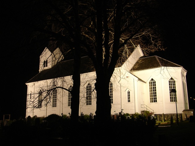 Bilete Selje kyrkje